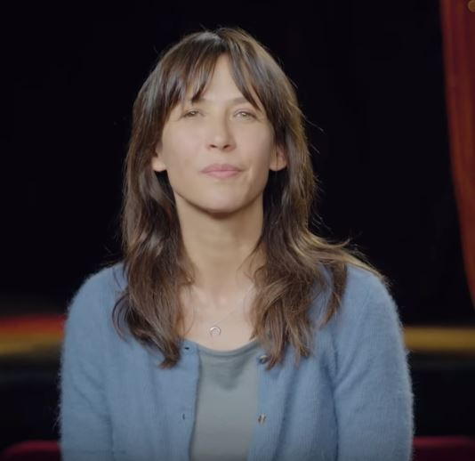 Sophie Marceau commente une enquête de L214